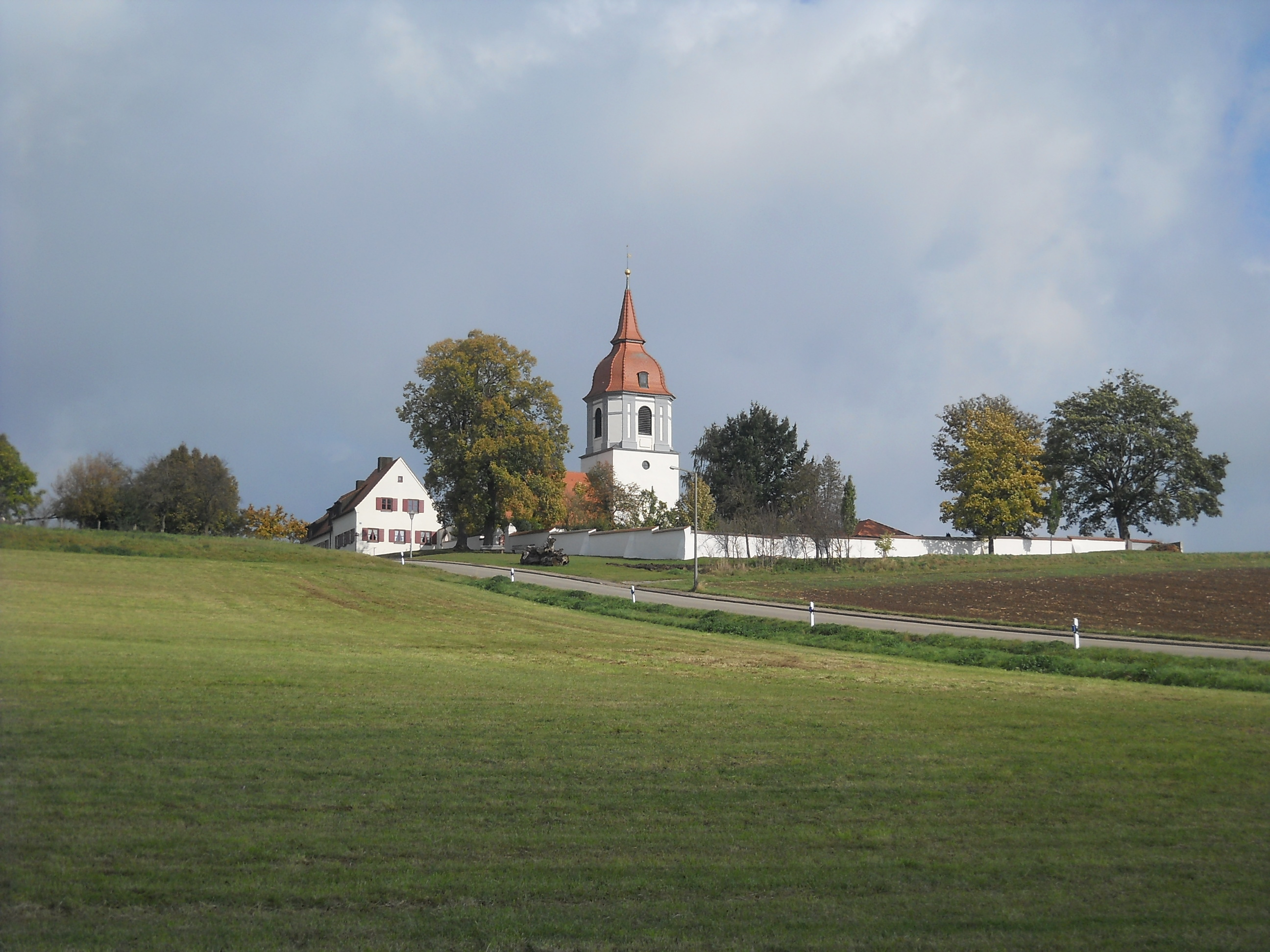 Unterasbach, Ortsteil von Gunzenhausen im mittelfränkischen Landkreis Weißenburg-Gunzenhausen (Bayern), die exponiert auf dem Altmühl-Talrand gelegene evangelische Pfarrkirche St. Michael